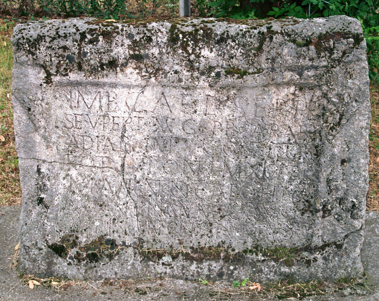 Bau- oder Ehreninschrift für Kaiser Septimius Severus und Caracalla. Literatur: RIU 3 Nr. 840.